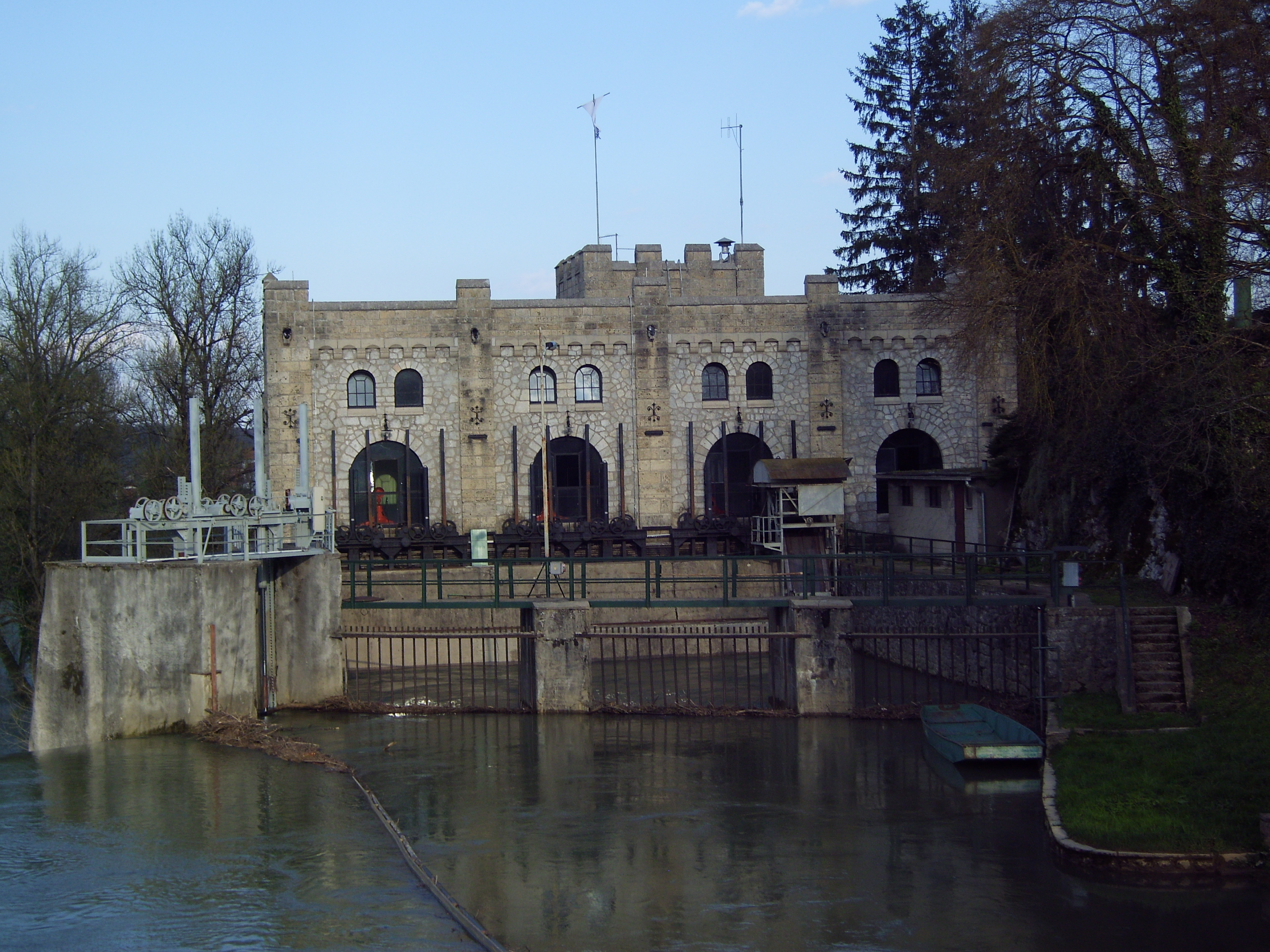 Wasserkraftwerk "Munjara, erbaut 1907/1908"